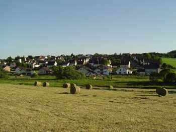 Mogendorf.